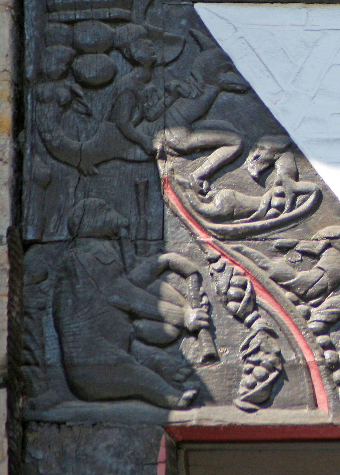 Huneborstelsches Haus in Braunschweig, Details der Fassade